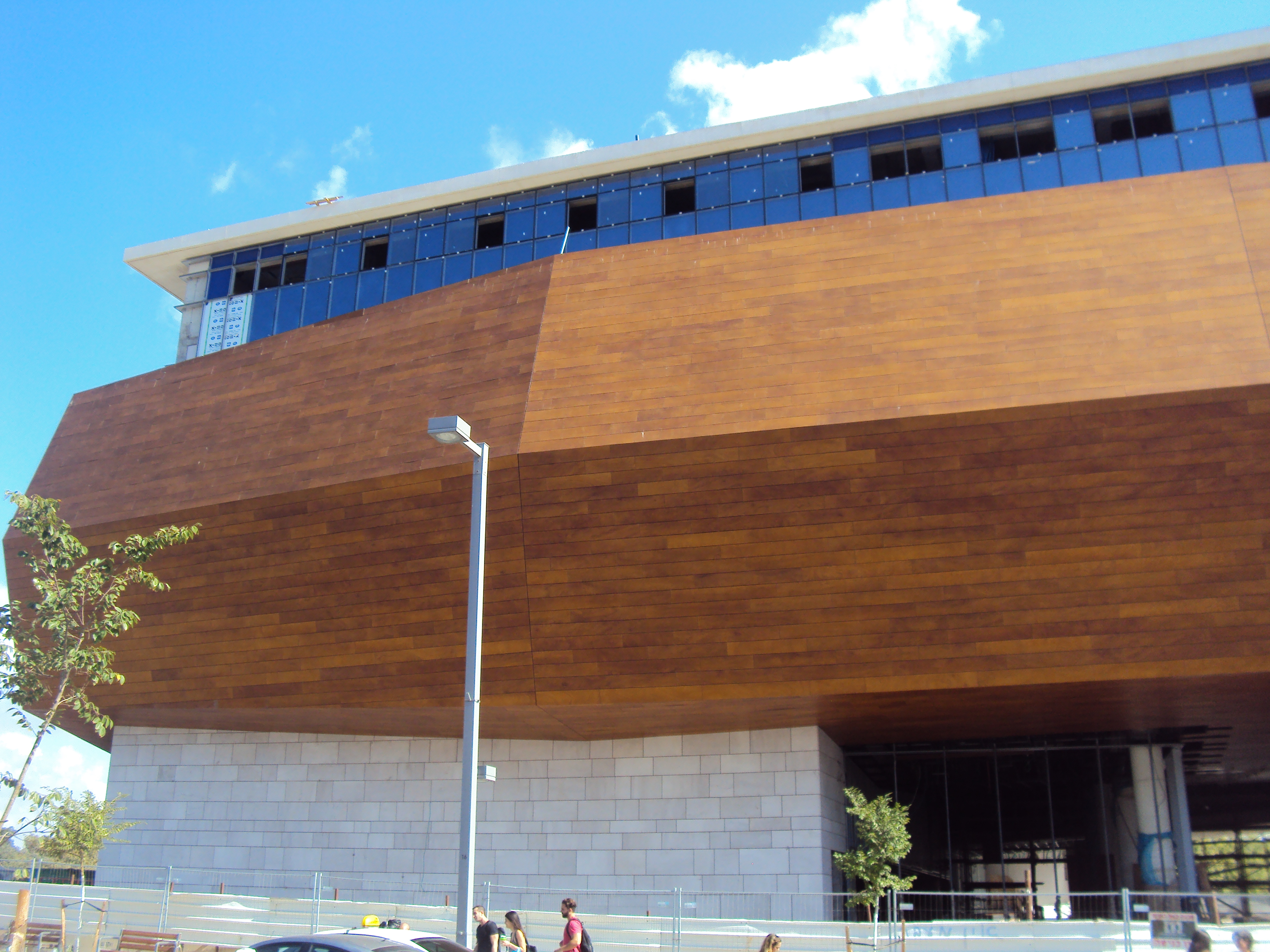 בנין מוזיאון הטבע ע"ש שטיינהרדט בבנייה